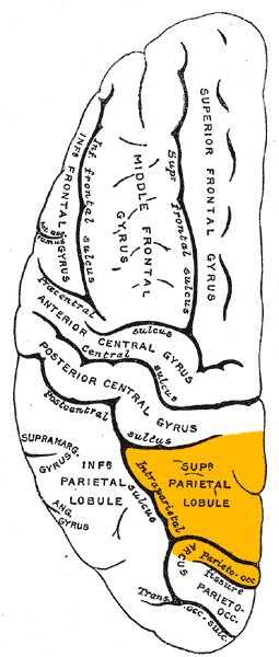 superior parietal lobule.